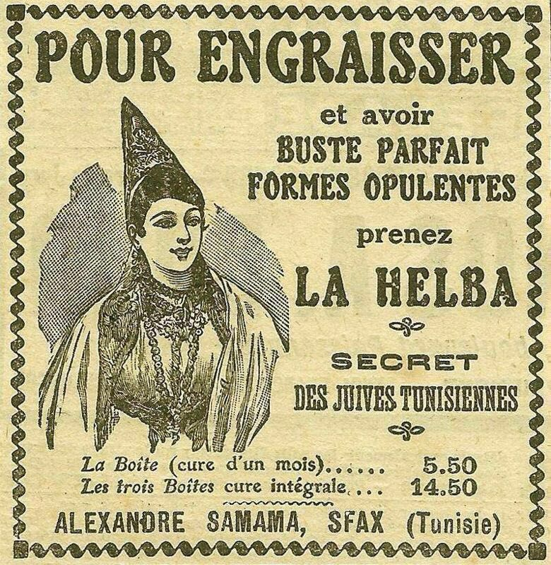 Publicité ou réclame "La Helba" pour engraisser et avoir des "formes opulentes, un buste parfait". "Secret des Juives tunisiennes". Alexandre Samama. Sfax, Tunisie. Fin XIXème - début XXème s. ?